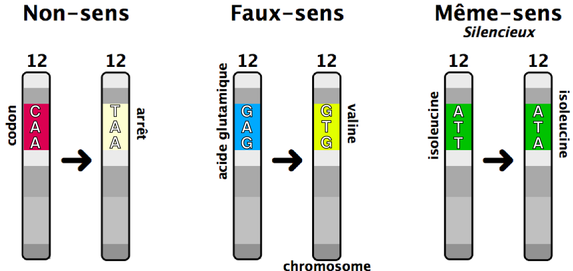 mutation ponctuelle, non-sens, faux-sens, silencieux, génétique, codon, chromosome, mutation génétique, gène